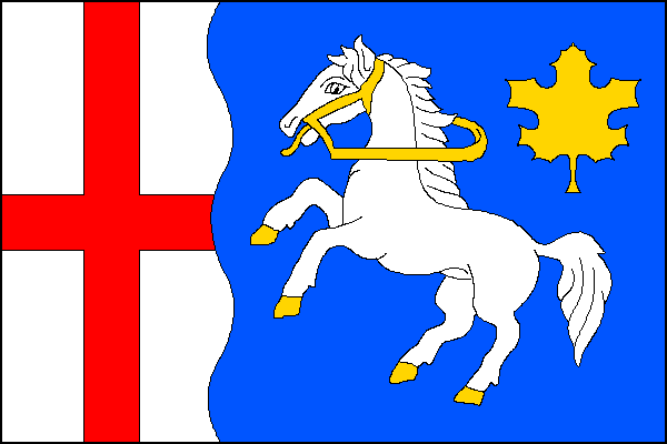 vlajka, Javornice, okres Rychnov nad Kněžnou